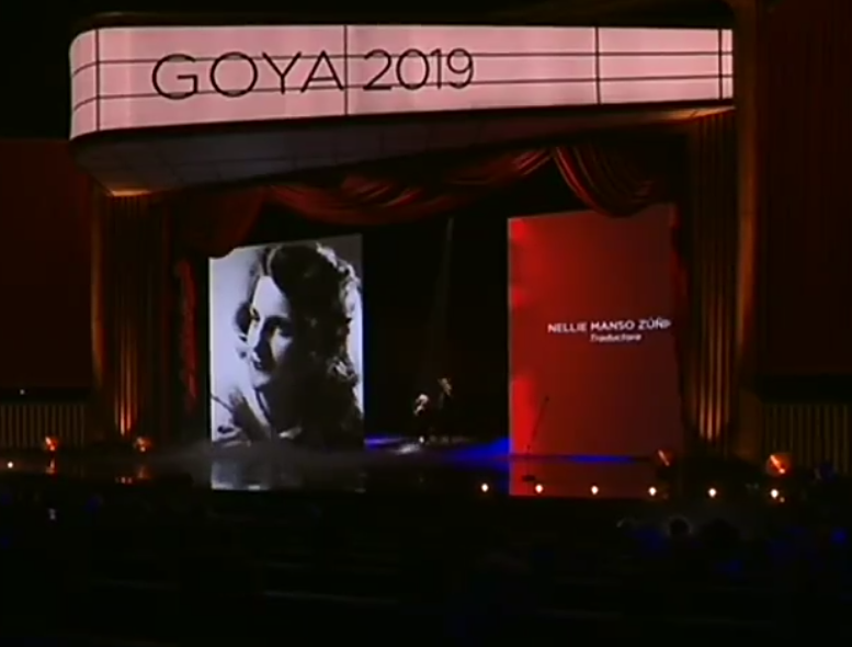 Nellie Manso de Zúñiga